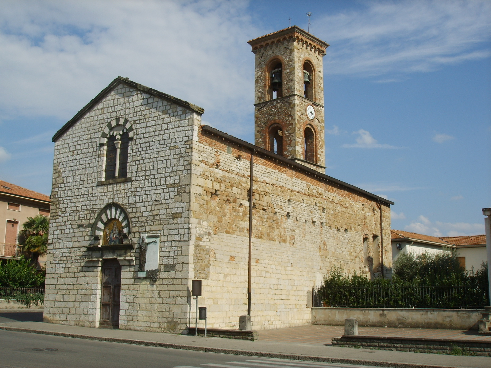 Chiesa di San Pietro a Galciana